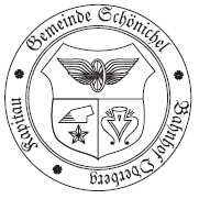 Wappen von Schönichel